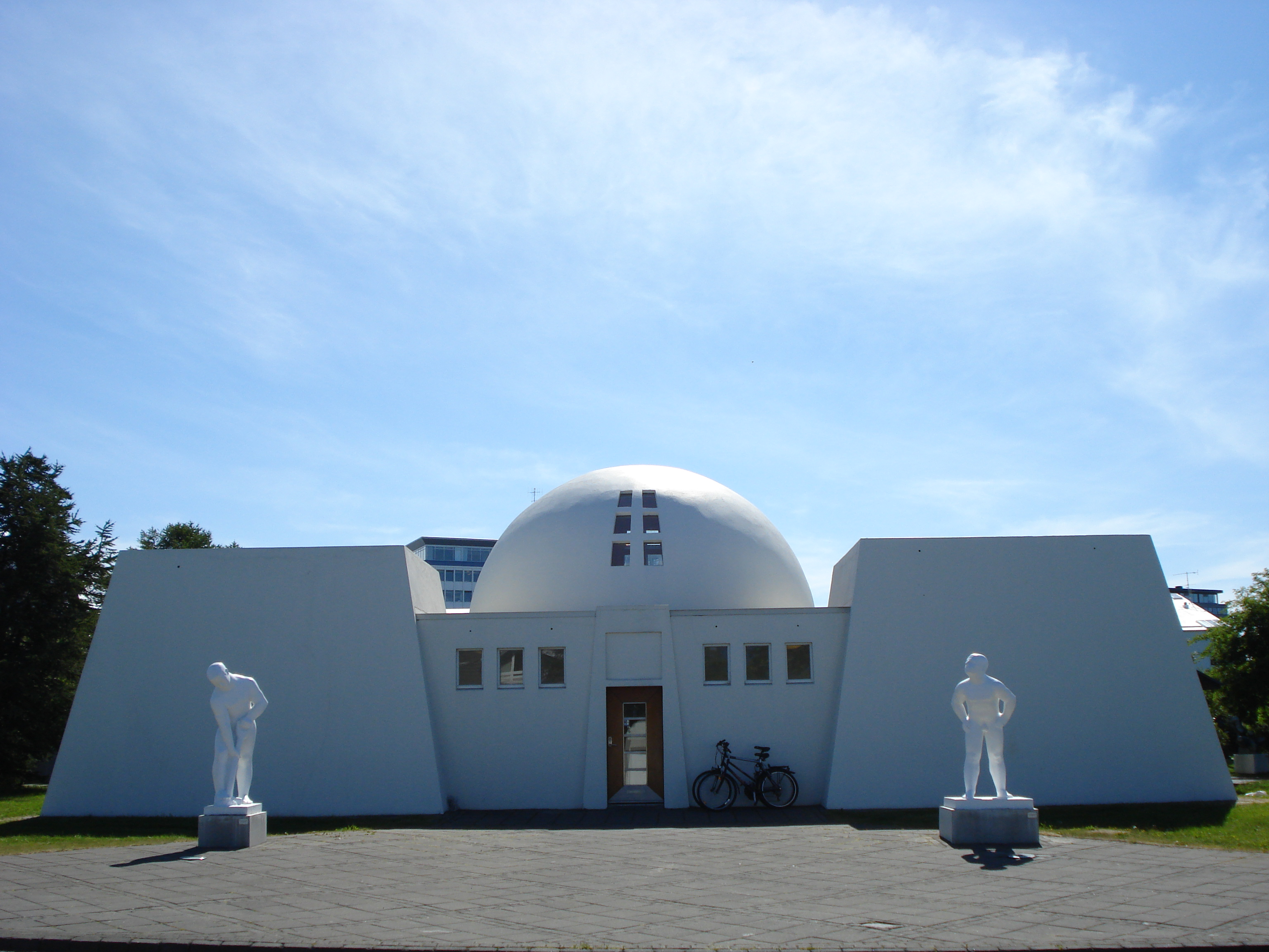 Museum Ásmundur Sveinsson